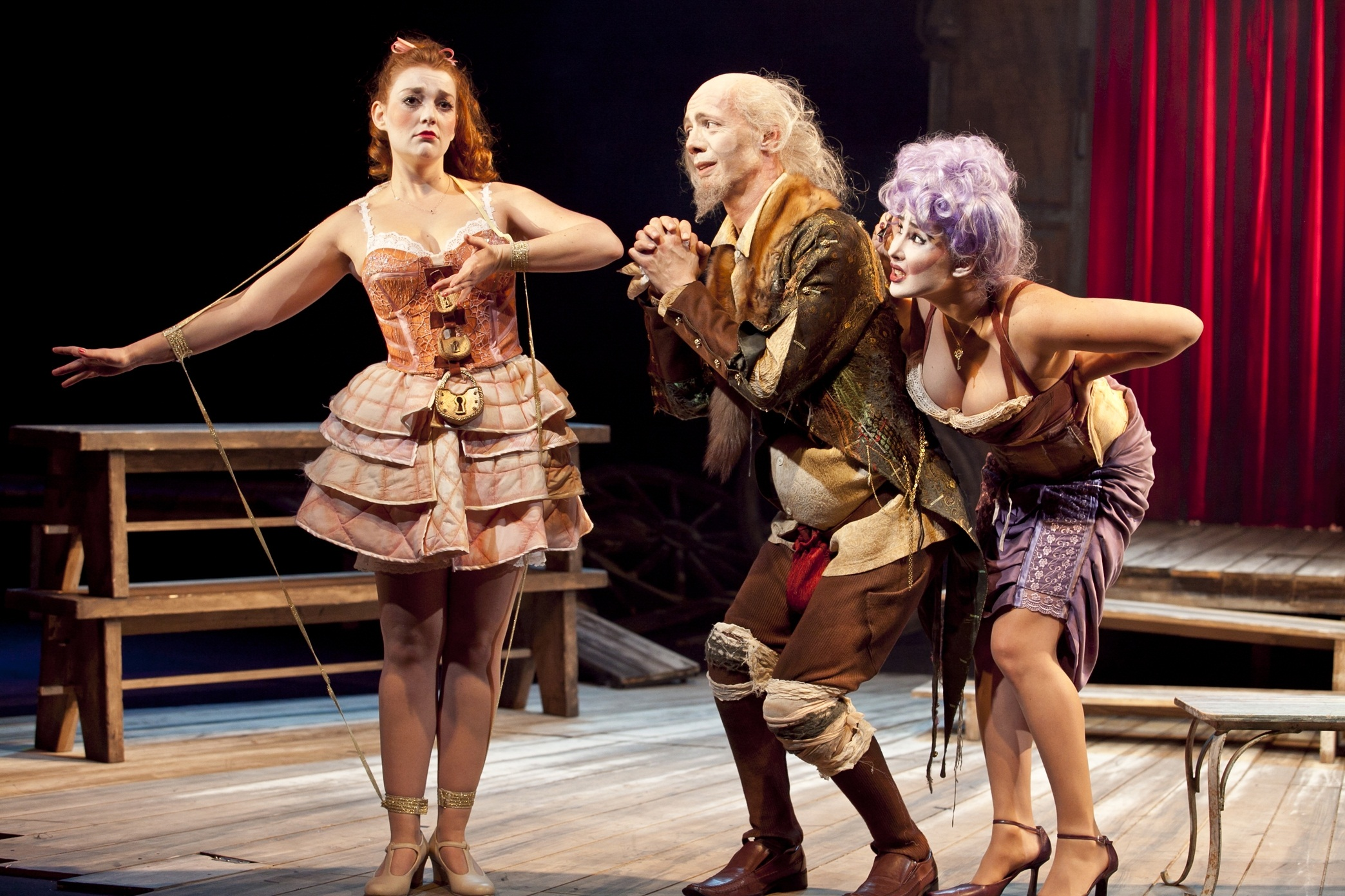 ההצגה מנדראגולה, בבימויו של גלעד קמחי, עיצוב תלבושות של אולה שבצוב, עיצוב תפאורה ערן עצמון, עיצוב תאורה קרן גרנק, תיאטרון בית ליסין, 2011